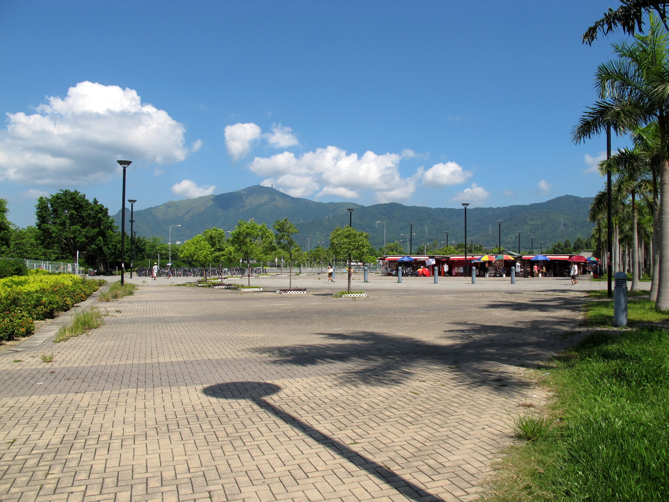 Kam Sheung Road Station Outside Plaza